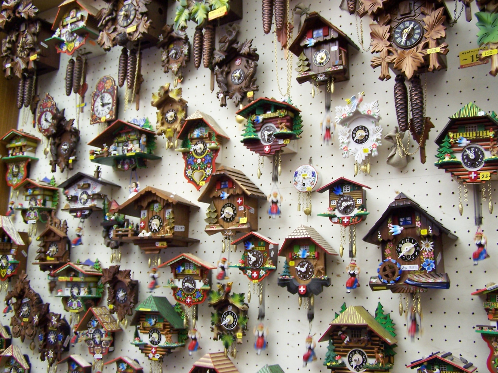 geotagged, Lausanne